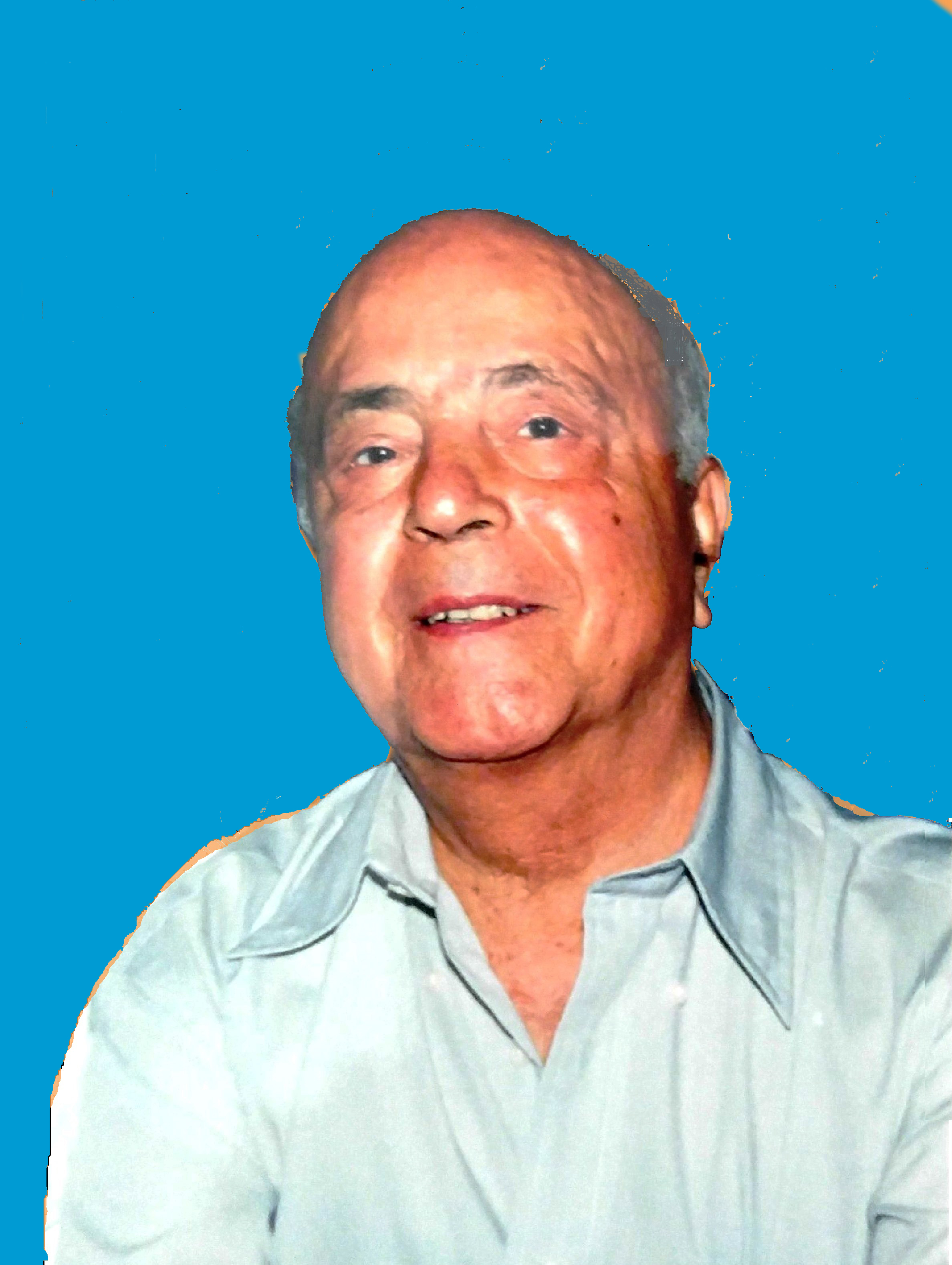 סוכן הביון הישראלי גמליאל כהן